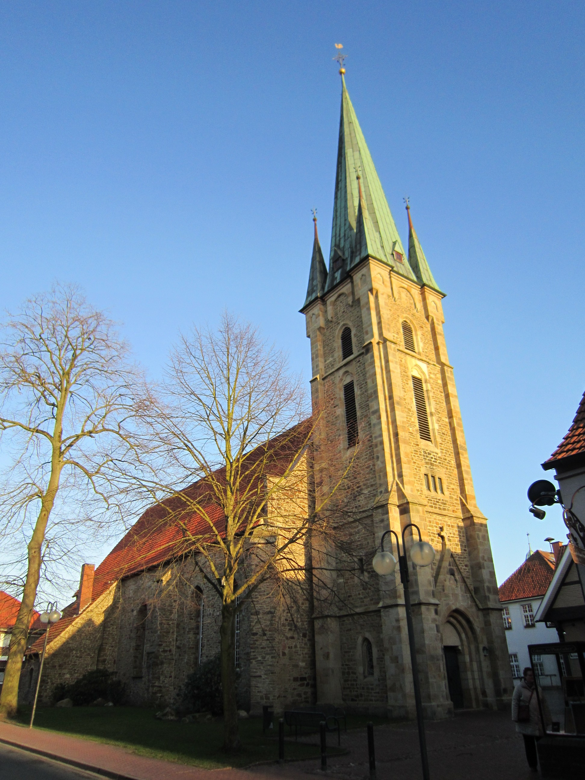 Evangelische Kirche St. Georg Fürstenau (Landkreis Osnabrück)